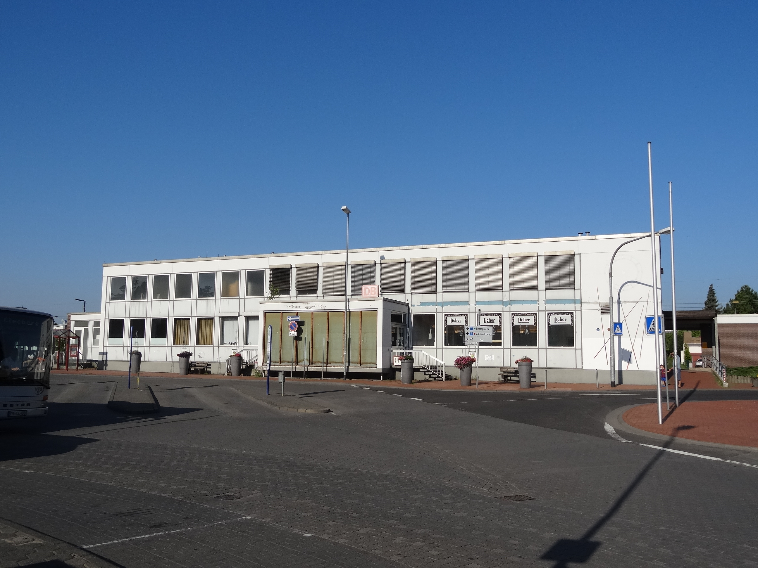 Bahnhof Butzbach